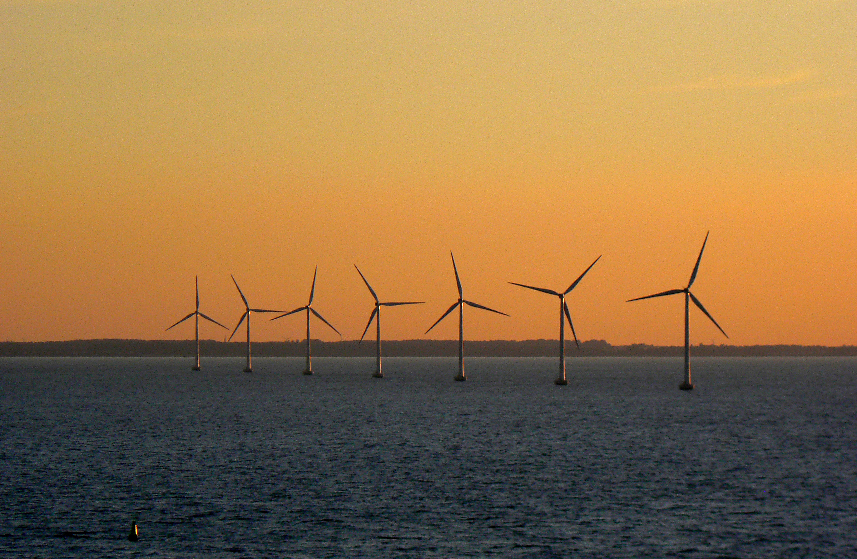 Der Sprogø Vindmølle Park nördlich der Great Belt Bridge. Aufgenommen am 23. August 2010